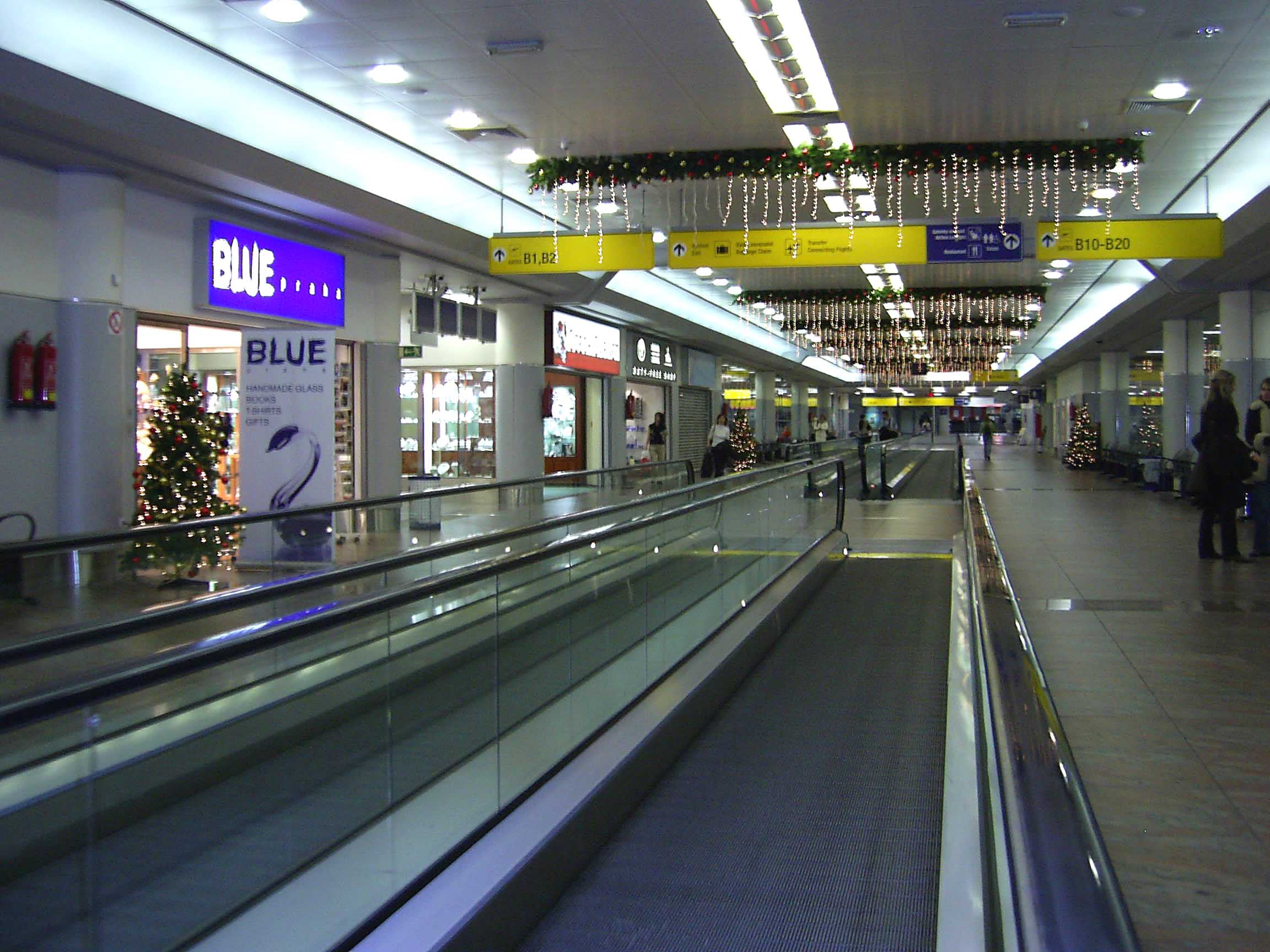 Travelátory na Letišti Václava Havla v Praze. Concourse B at Prague Airport